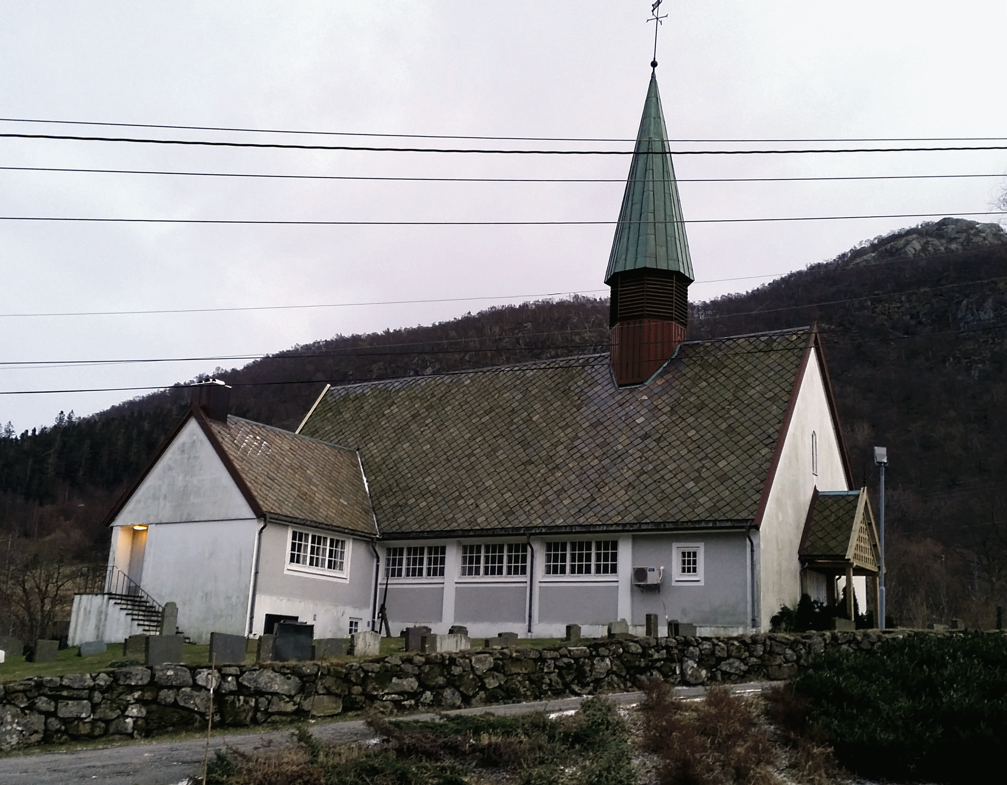 Herad kirke på Briseid i Herad.